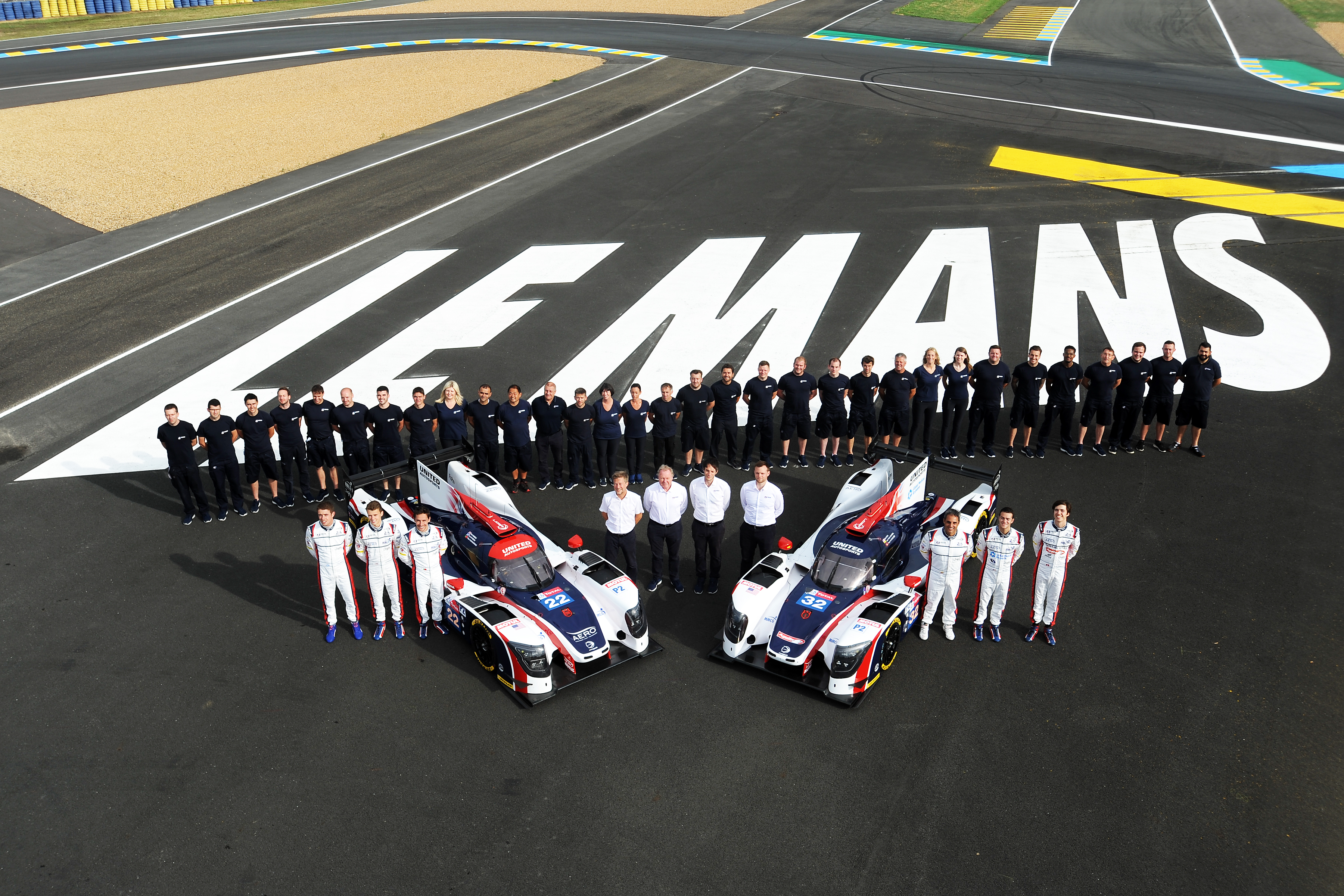 United Autosport lors des 24 Heures du Mans 2018.